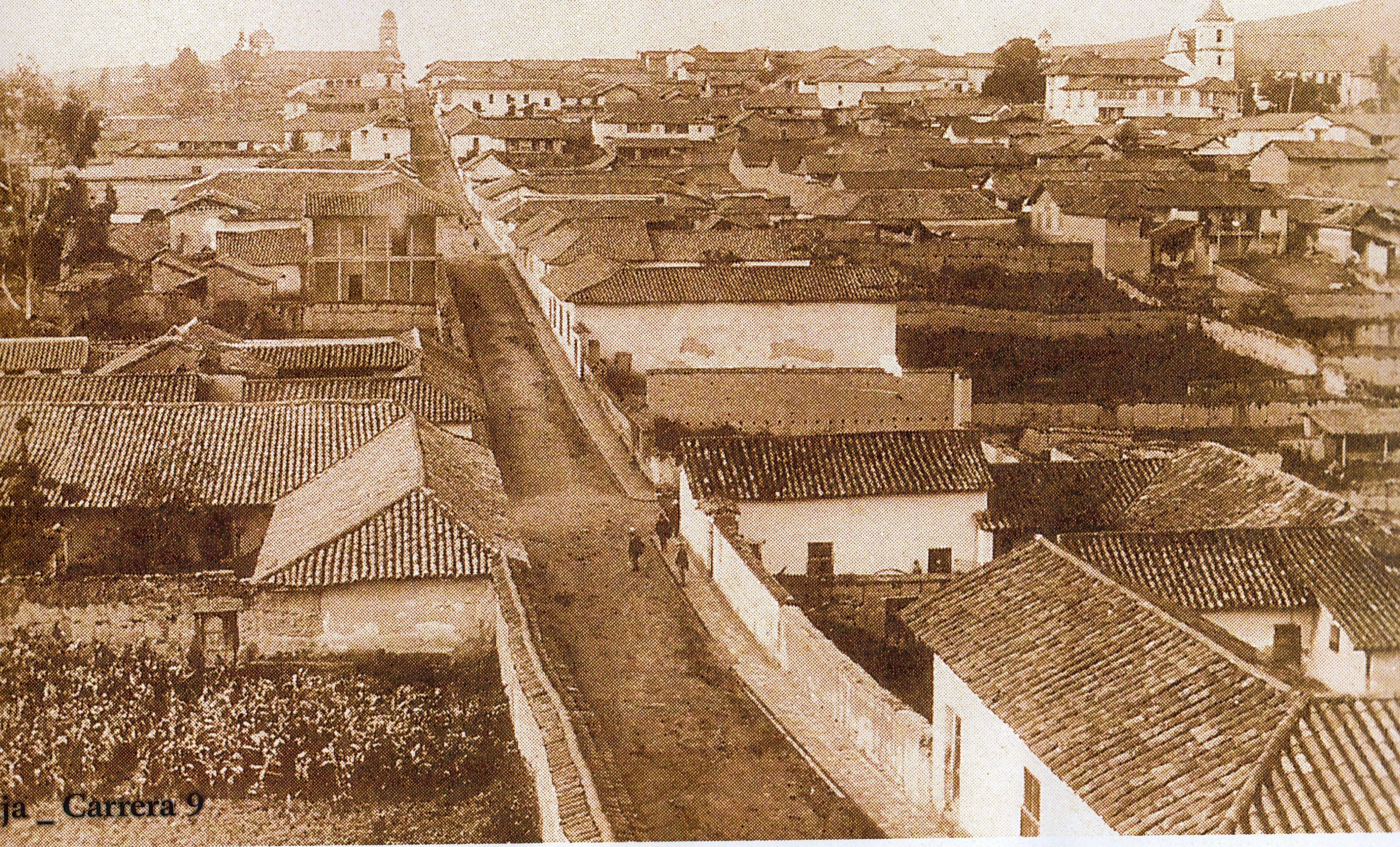 Tunja a fines del siglo XIX.